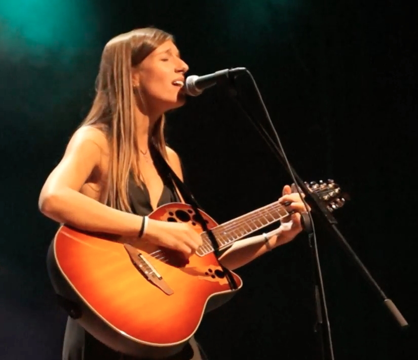 Anaïs Vila tocant "Em perdo" a l'aniversari de La Escalera al Teatre Auditori del Mercat Vell a Ripollet, el 10 setembre 2016.